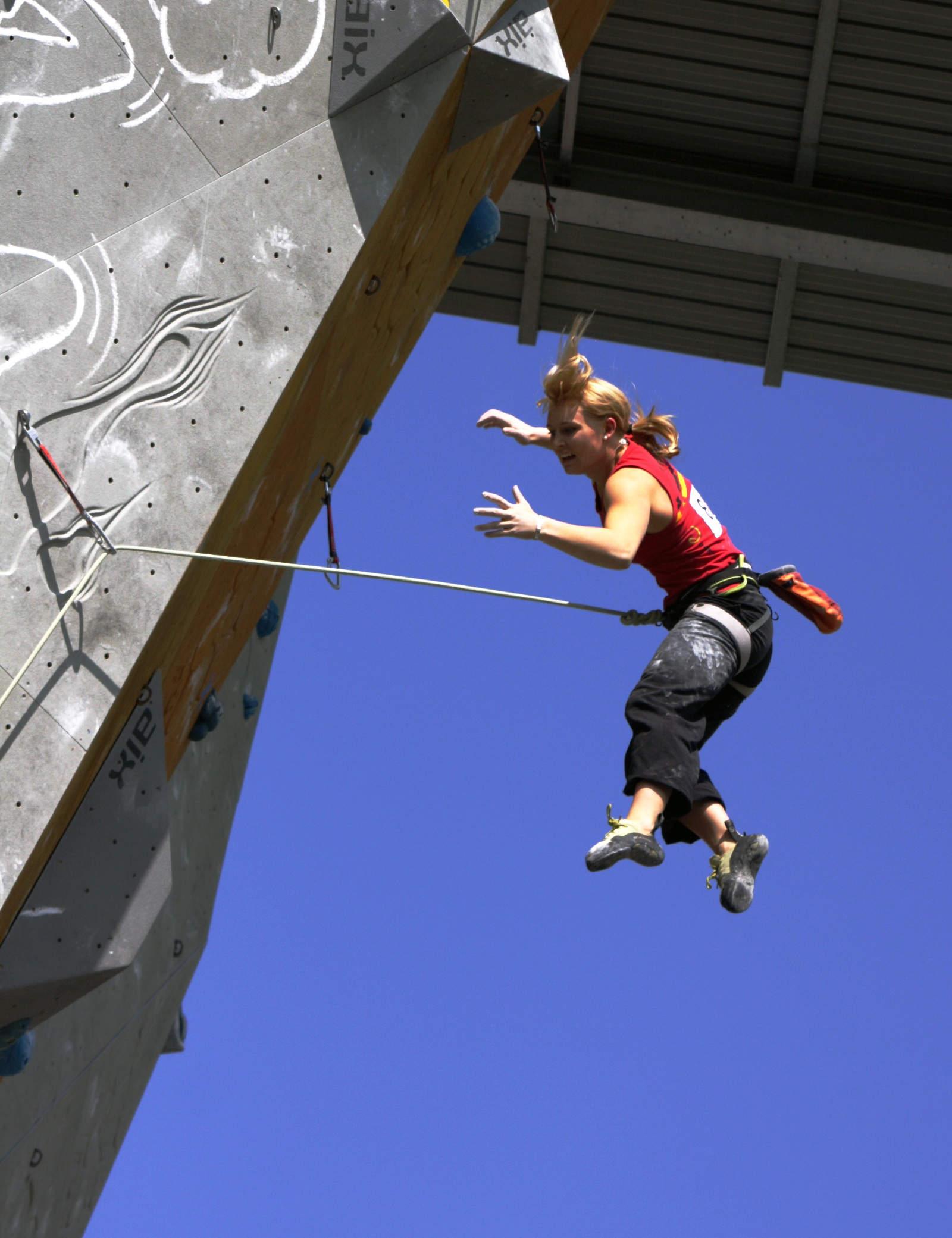 Vorstiegsturz beim European Youngs Series Climbing 2009 in München. Startnummer 8 Ines Dull.